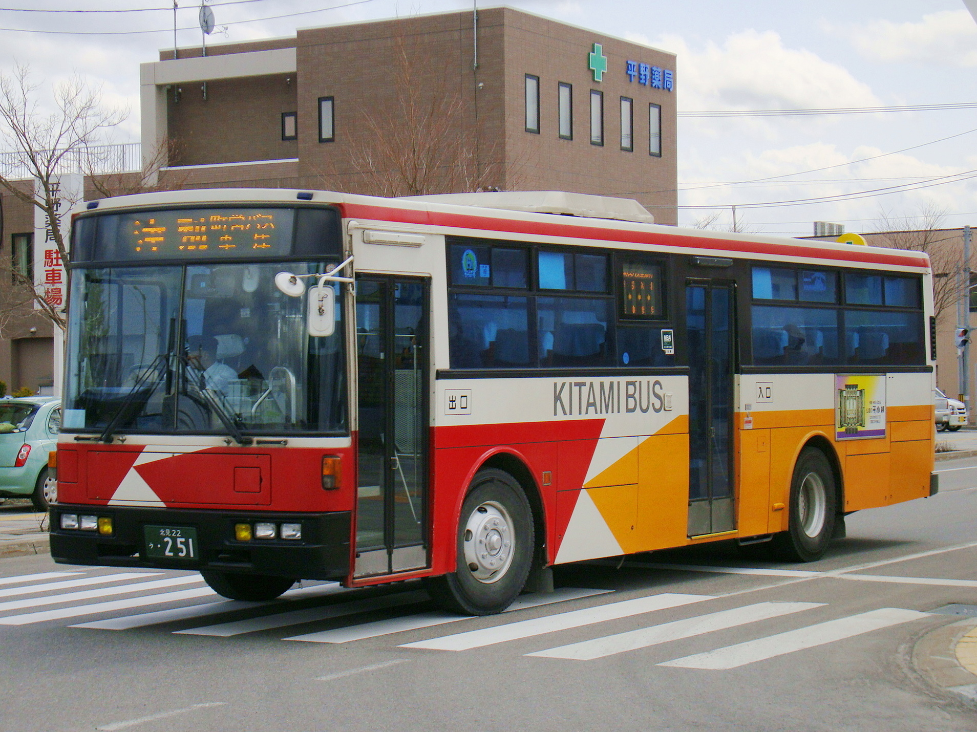 Kitami to Tsubetsu